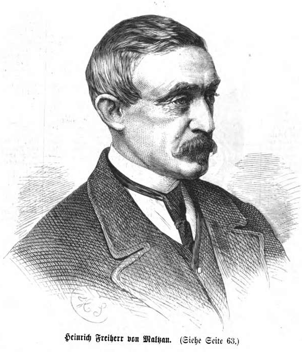 Heinrich von Maltzan, deutscher Orientalist im 19. Jh.